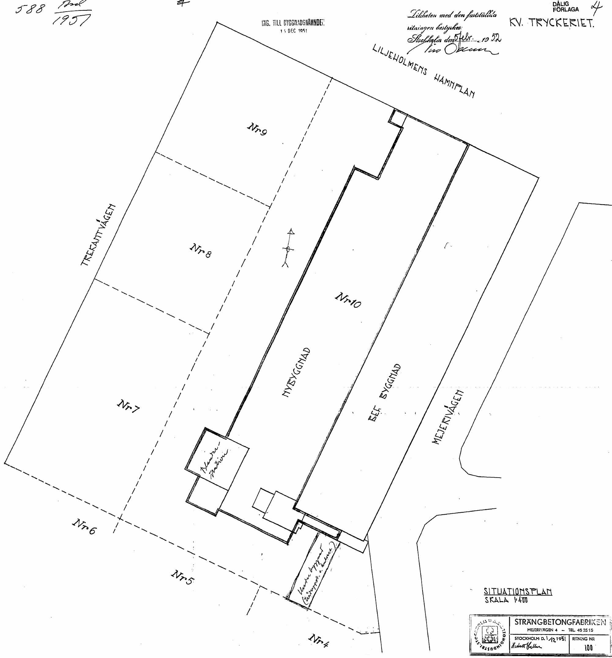 Översiktsplan till Kvarteret Tryckeriet